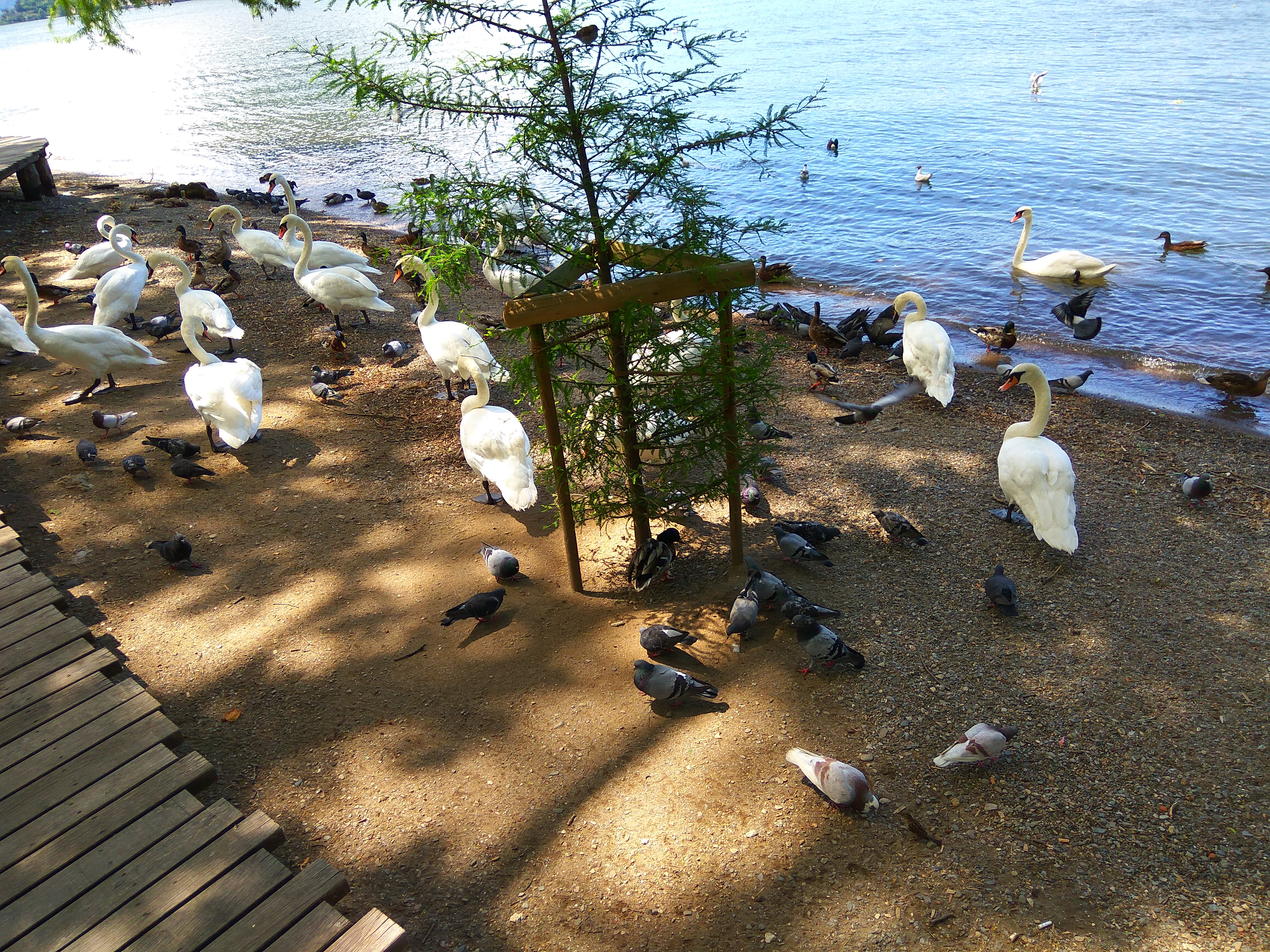 На озері Лугано у місті Лугано